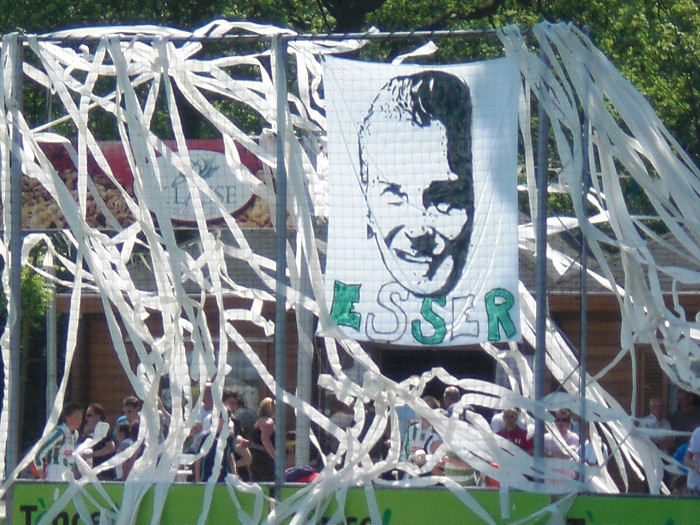 Tifo bij VV Kloetinge